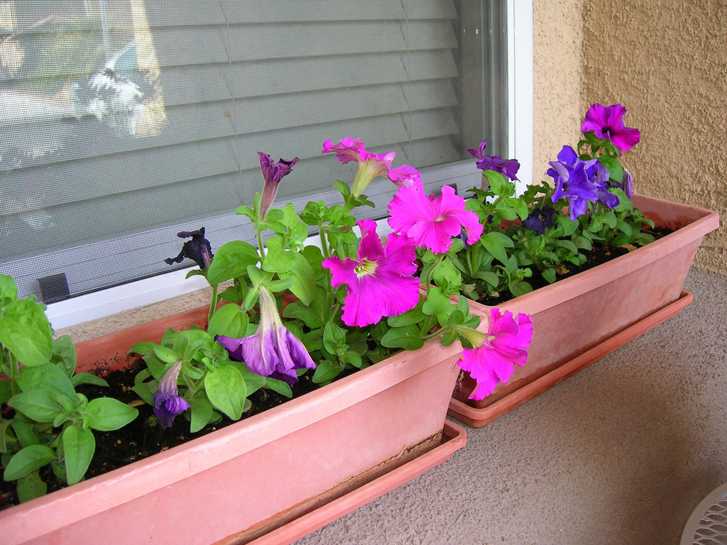 USA